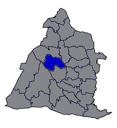 臺灣省彰化縣埔鹽鄉。